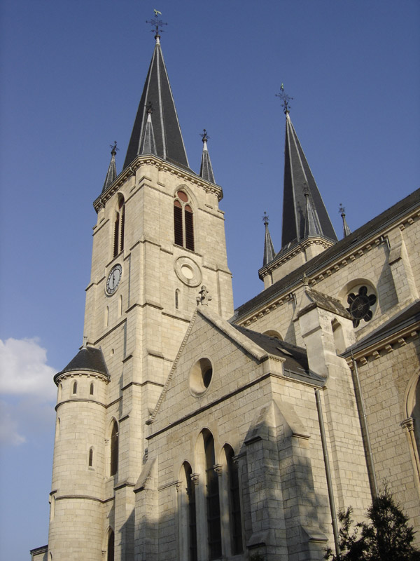 D'Klacketierm vu der Jousefkierch zu Esch-Uelzecht, den 3.9.2005.